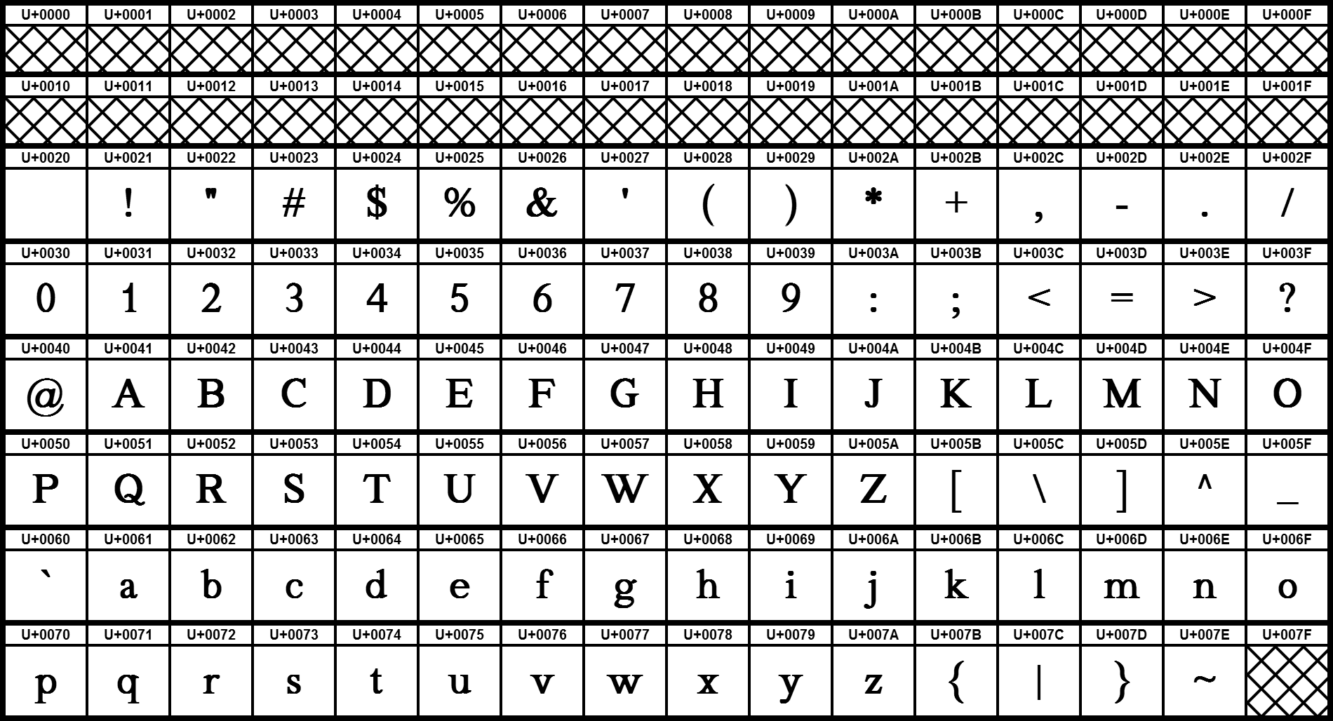 Grafiktafel für den Unicodeblock Basis-Lateinisch. Doppelt schraffierte Felder sind Kontrollzeichen.